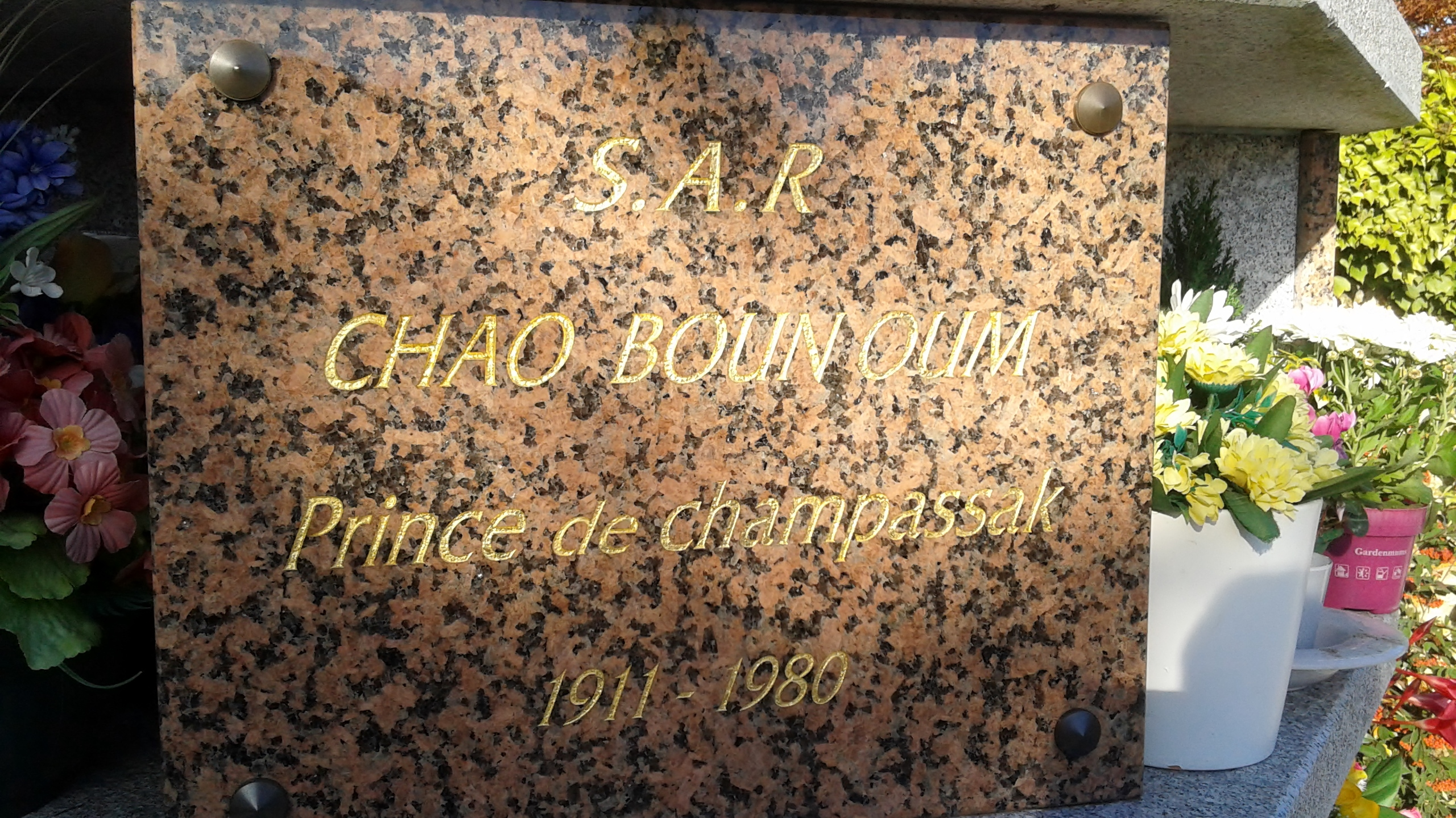 Cimetière de Meudon (92)